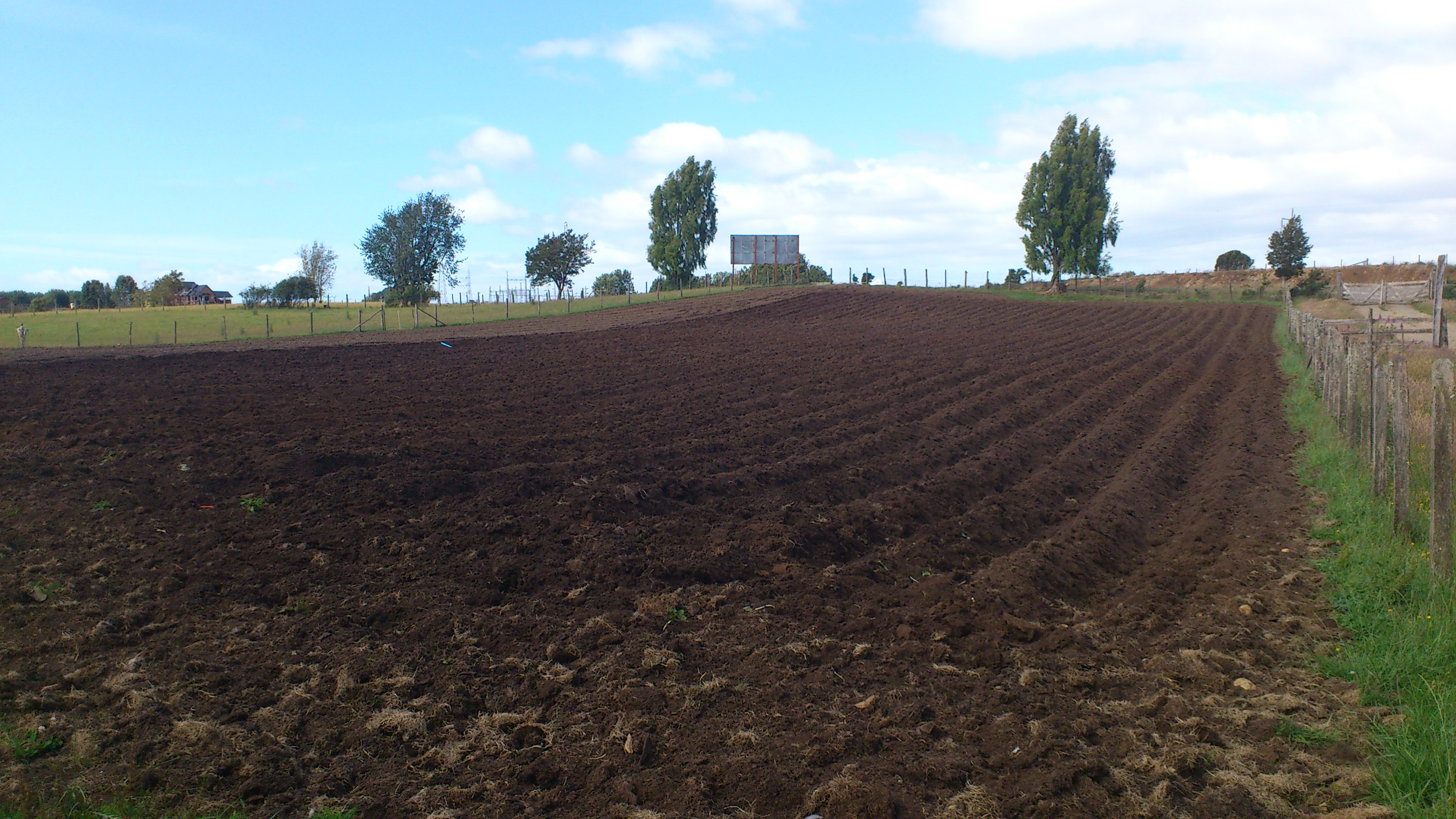 agricultira chilota en Llicaldad